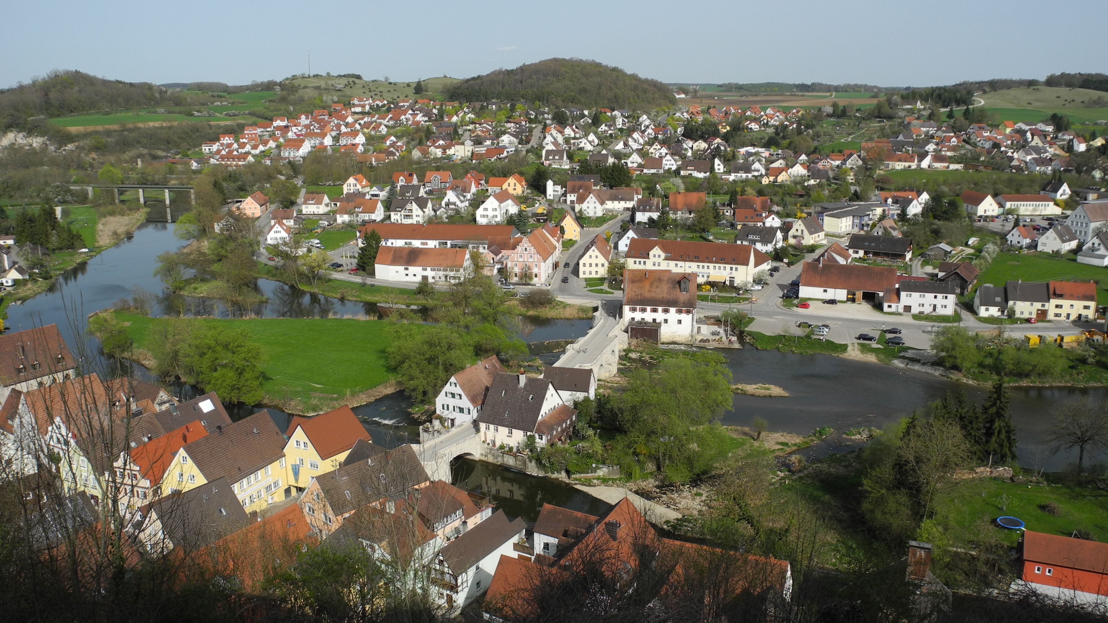 Harburg - Stadtansicht von der Burg02